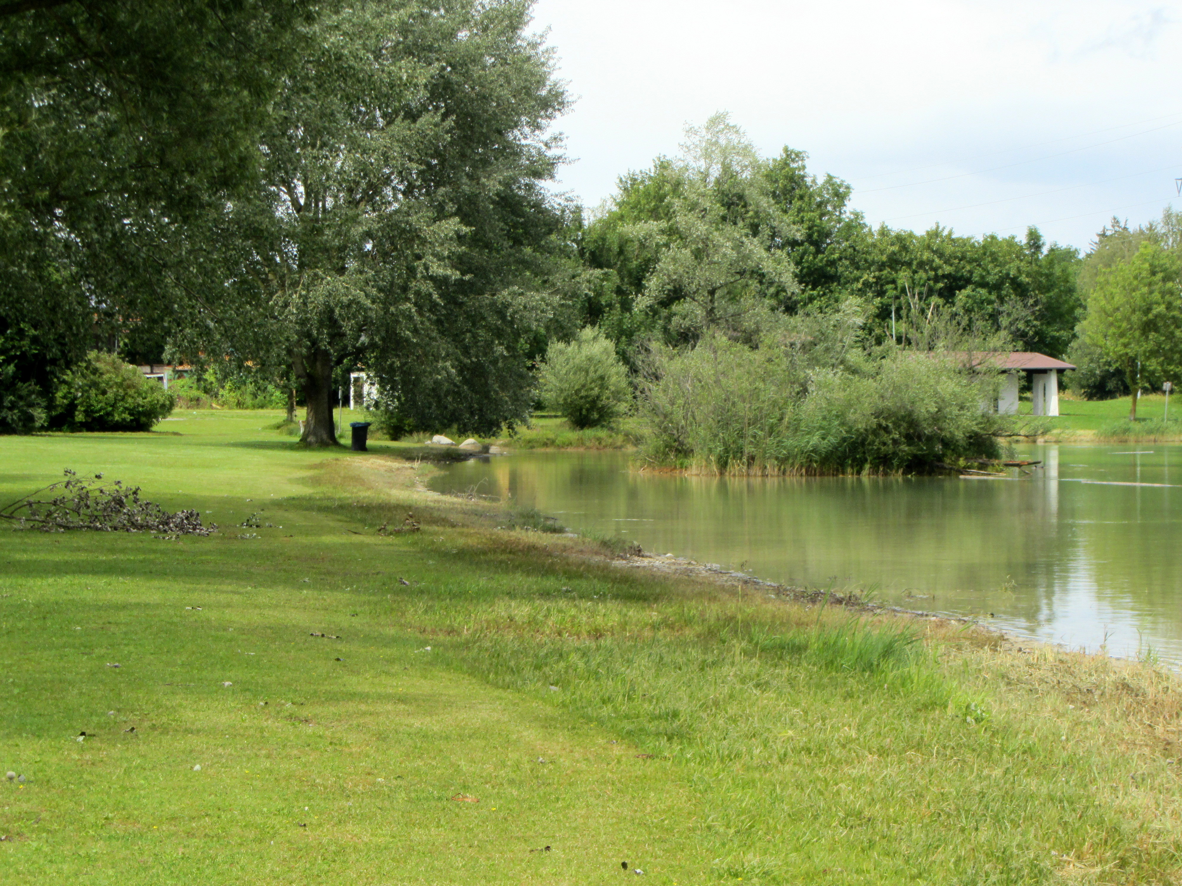 Sinninger Badeweiher